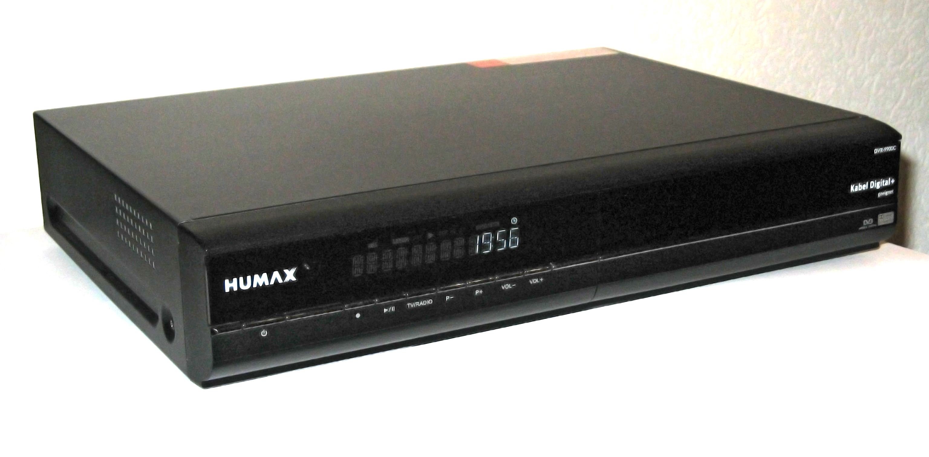 DVB-C Receiver Humax DVR-9900C der seit 2007 von Kabel Deutschland vermietet wird.